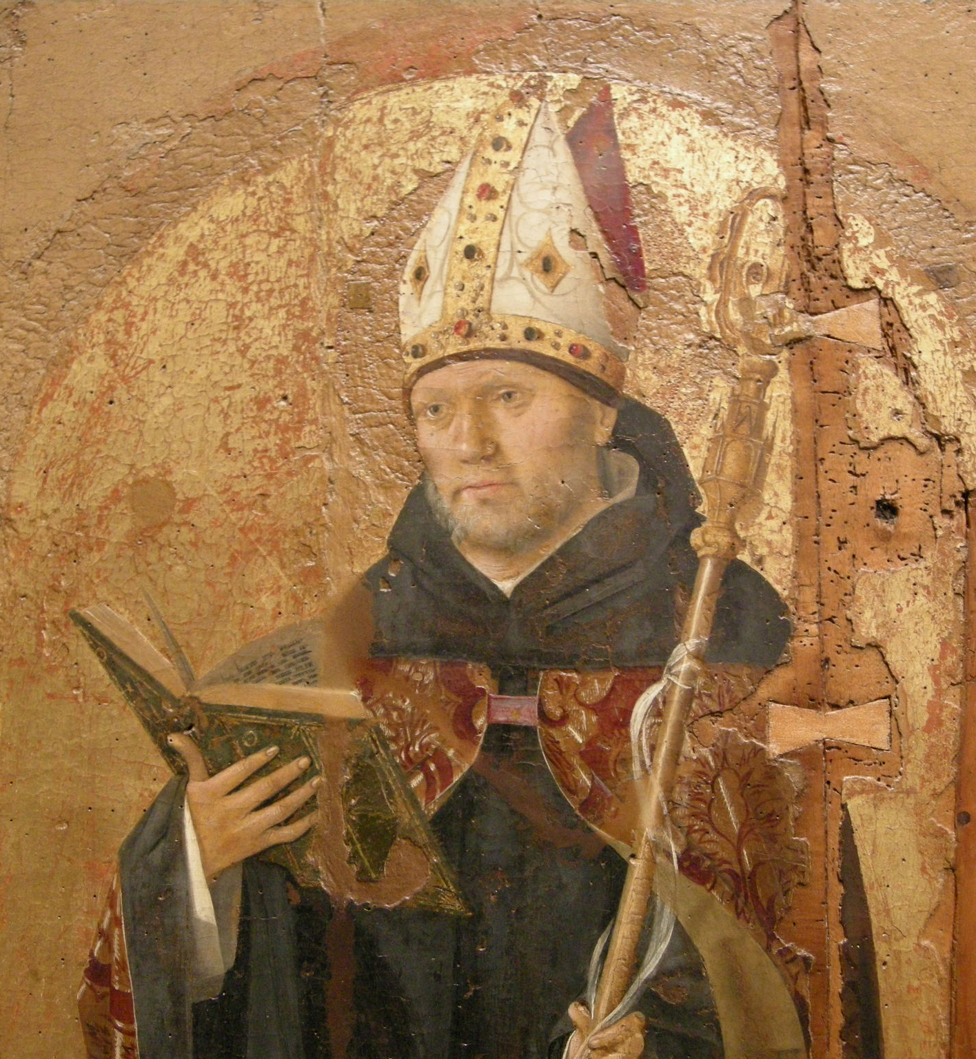 Museo regionale di messina, antonello da messina, polittico di san gregorio 04.2